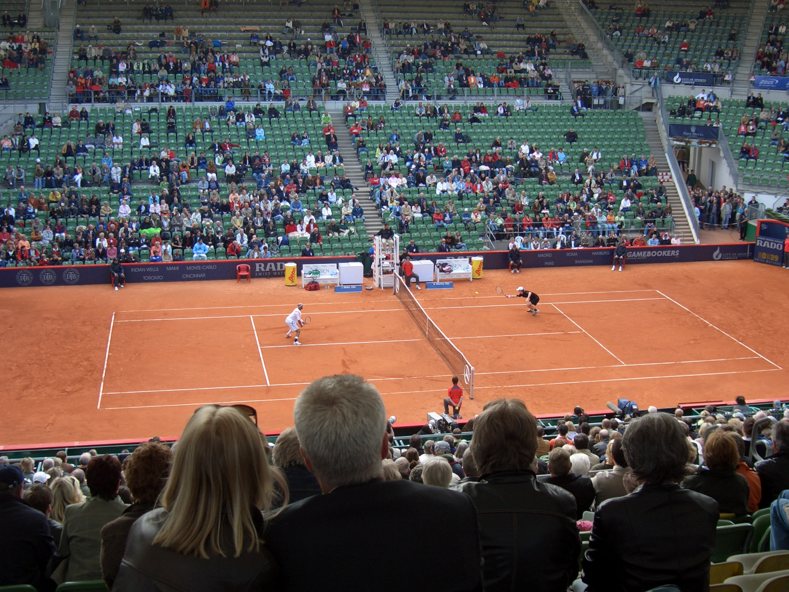 Хамбург Мастърс 2006: Момент от срещата между Джеймс Блейк и Анди Мъри Автор: HSV - собствена снимкаJames Blake – Andy Murray 6:3, 6:3